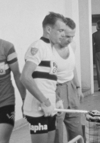 Tour de France , rustzaal van renners na de finish.